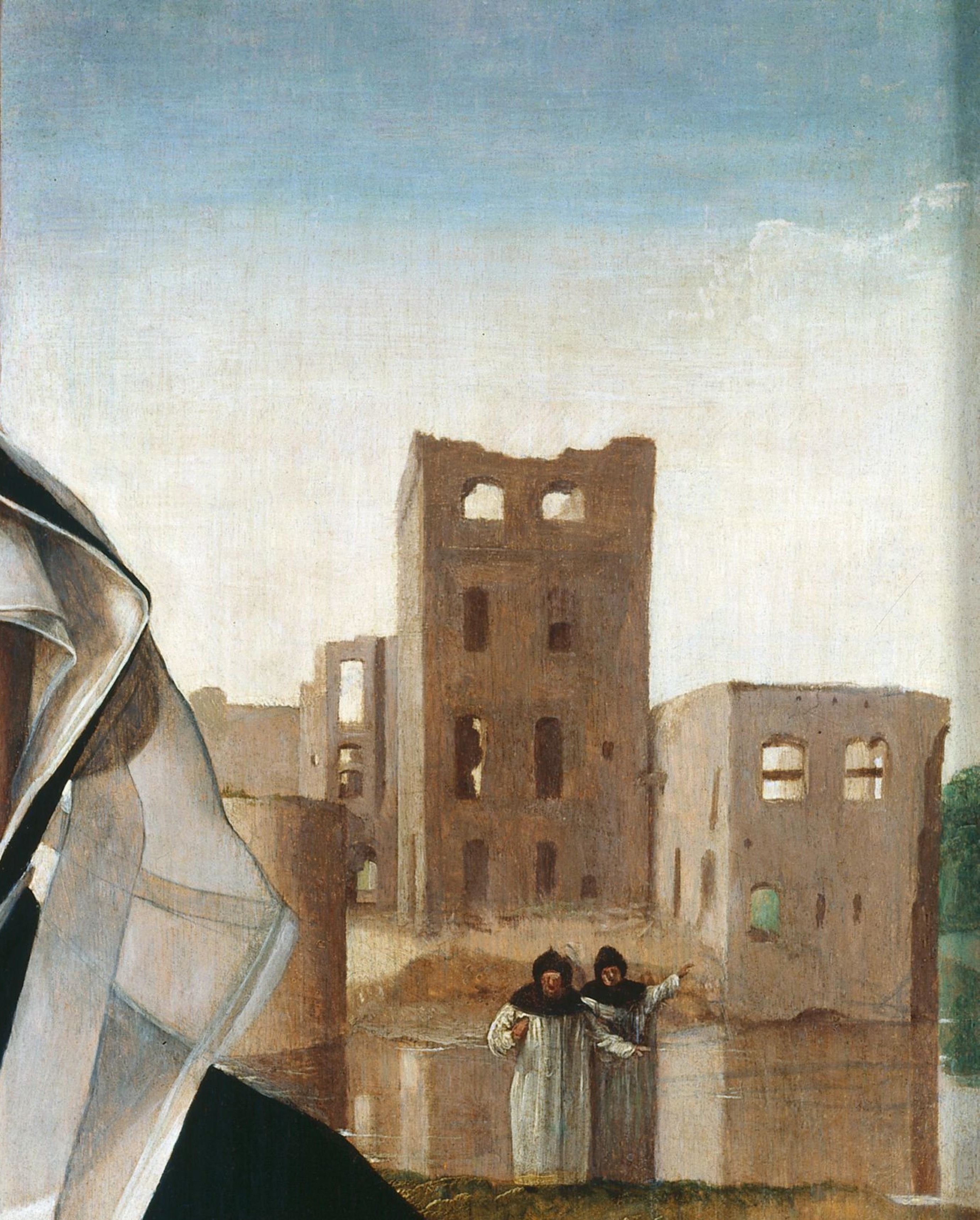 Vermoedelijke ruïne van Ewsum rond 1630